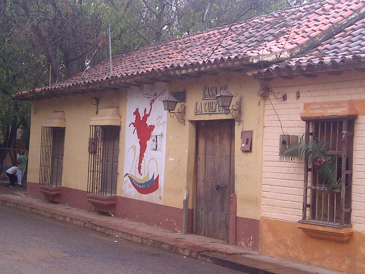 Casa de la cultura de Curarigua